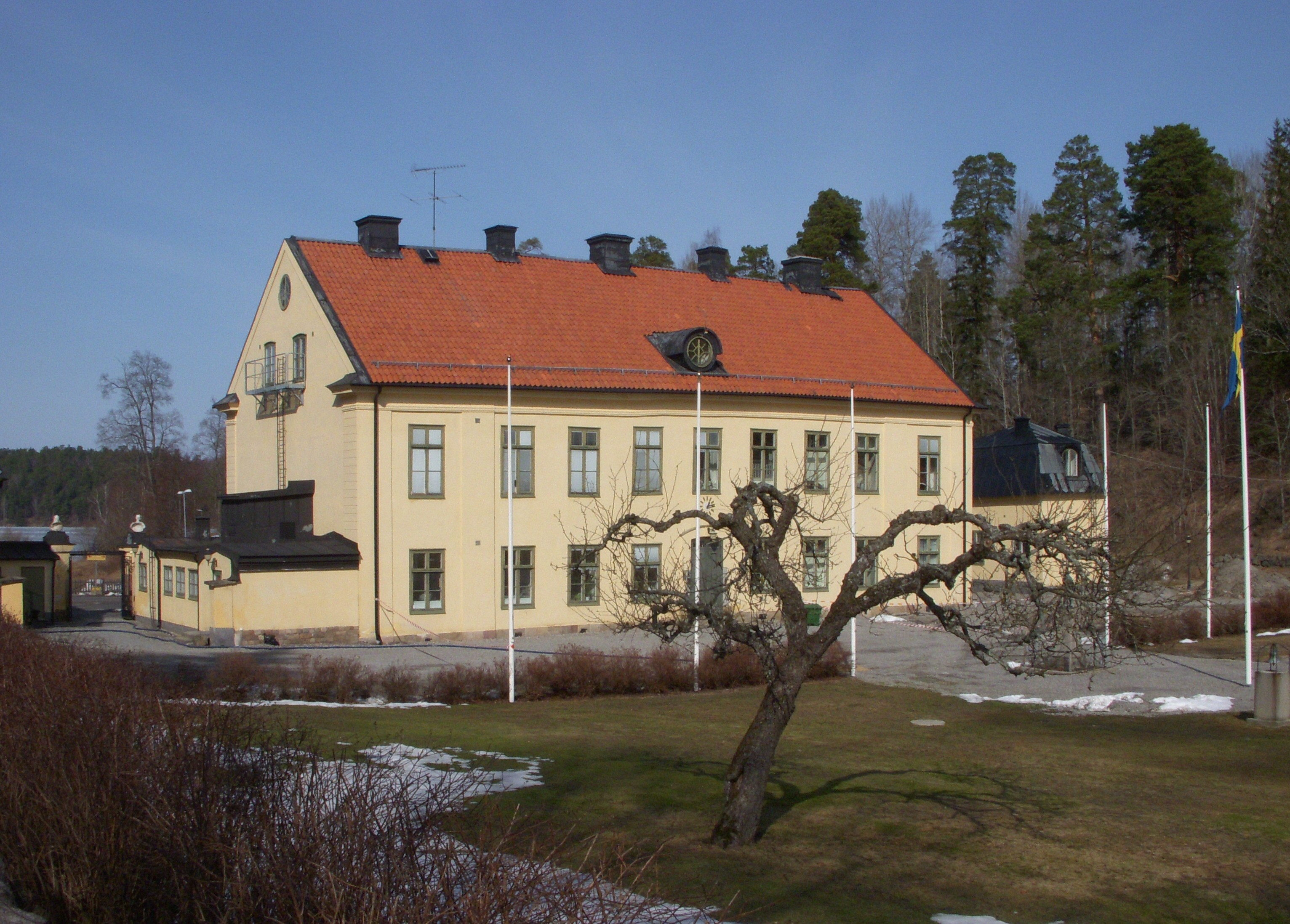 Vällinge Herrgård, idag Hemvärnets stridsskola i Salem